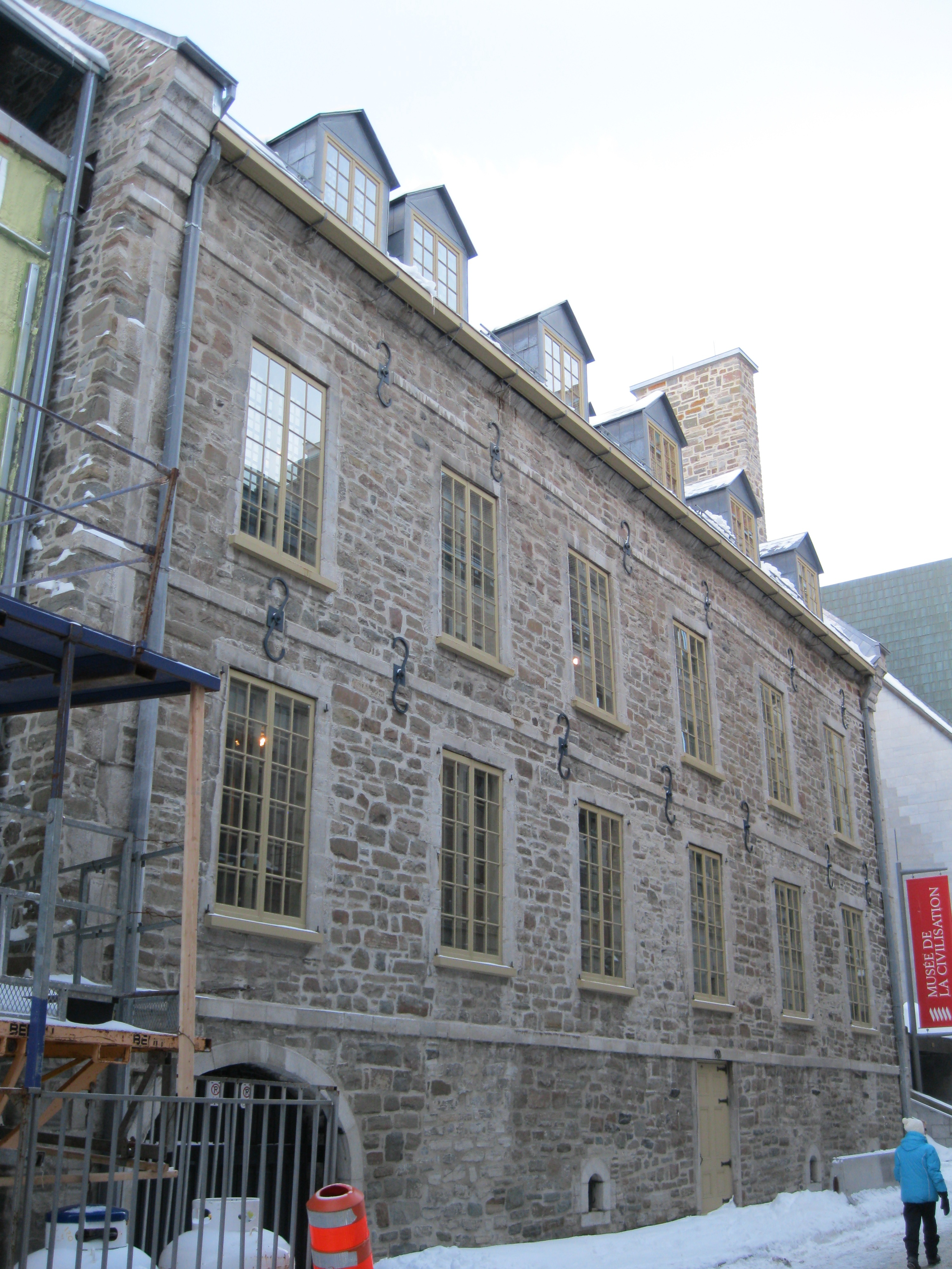 Maison Guillaume-Estèbe, musée de la Civilisation, Vieux-Québec